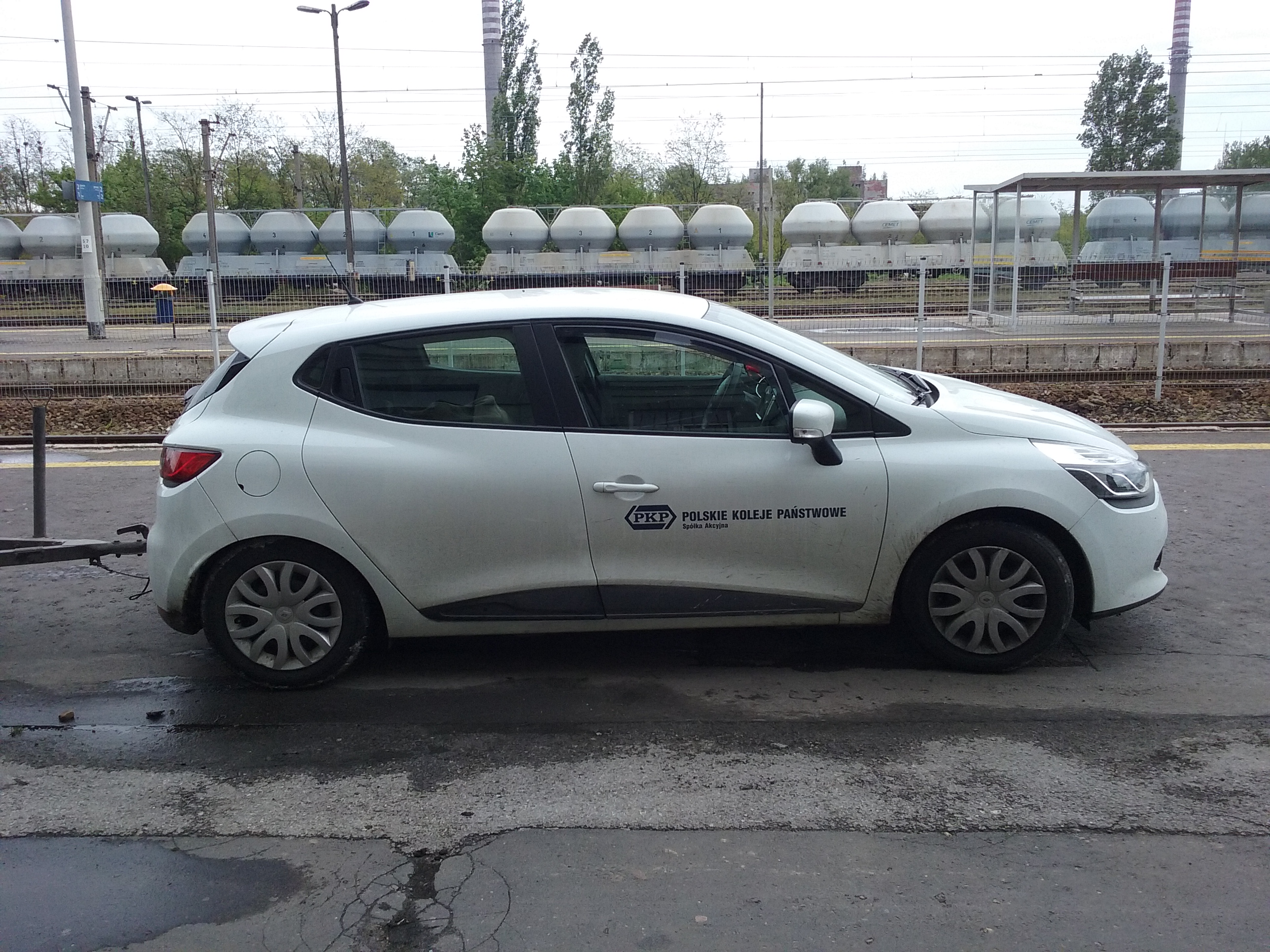 Samochód serwisowy PKP na dworcu kolejowym w Tomaszowie Mazowieckim, w województwie łódzkim, PL, EU. CC0